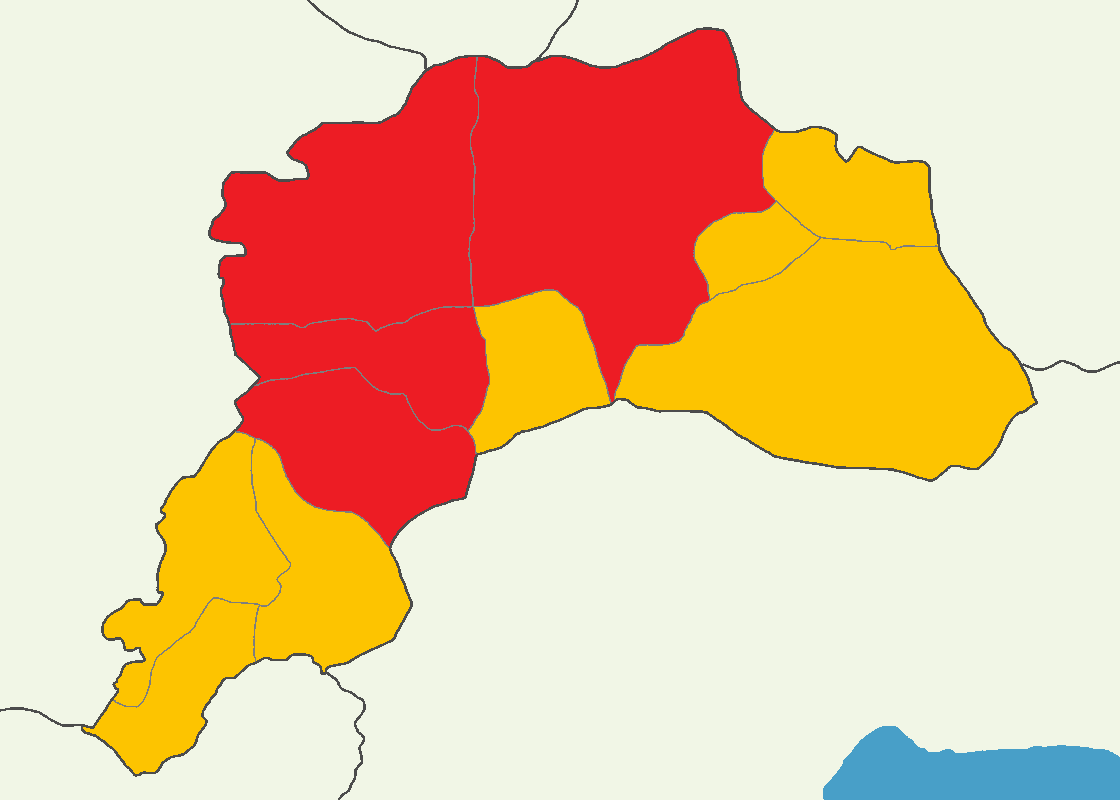 Burdur'da 2014 Türkiye Cumhurbaşkanlığı Seçimi